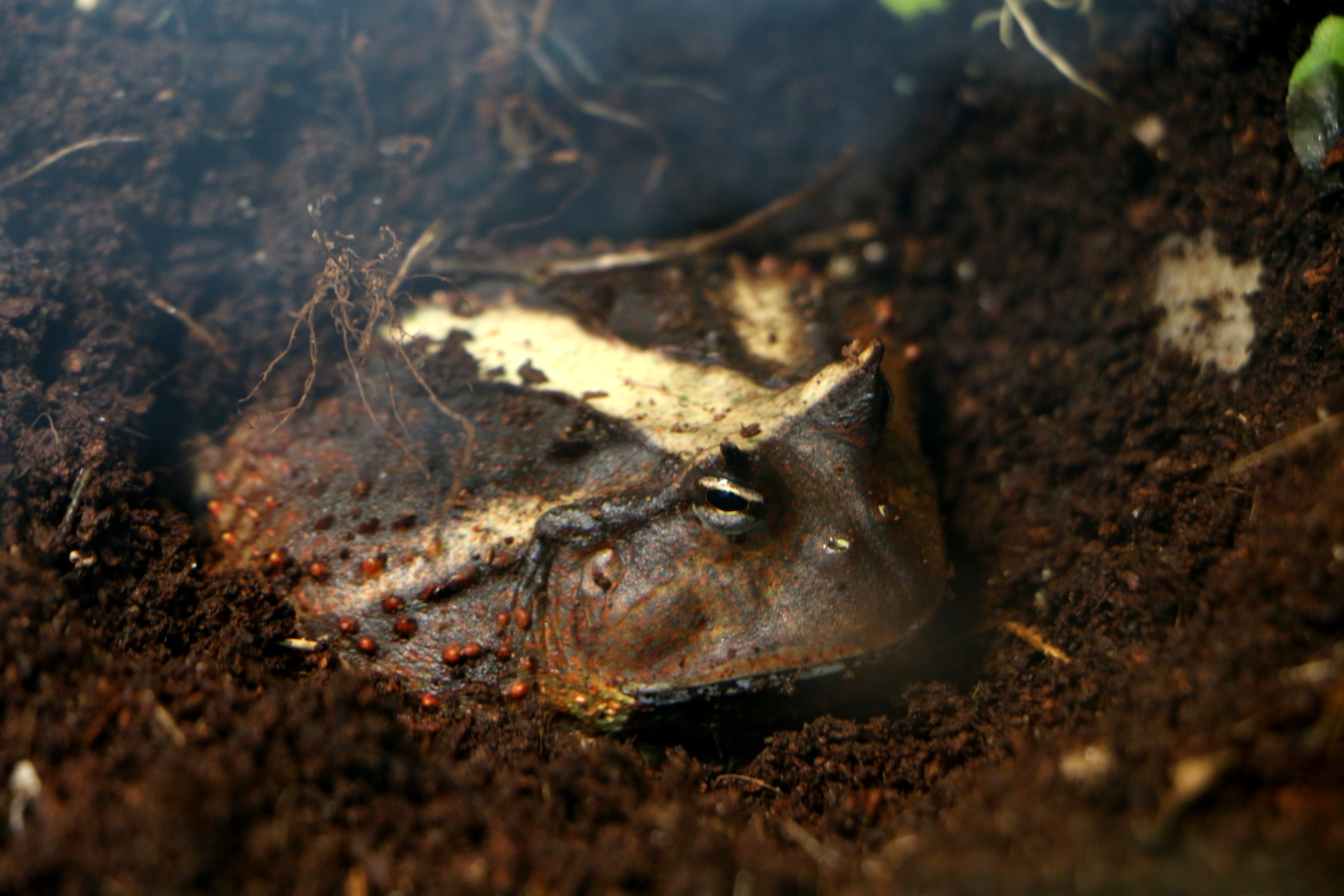 Grenouille cornue d'Amazonie Ceratophrys Cornuta au zoo de Vincennes - Paris, France